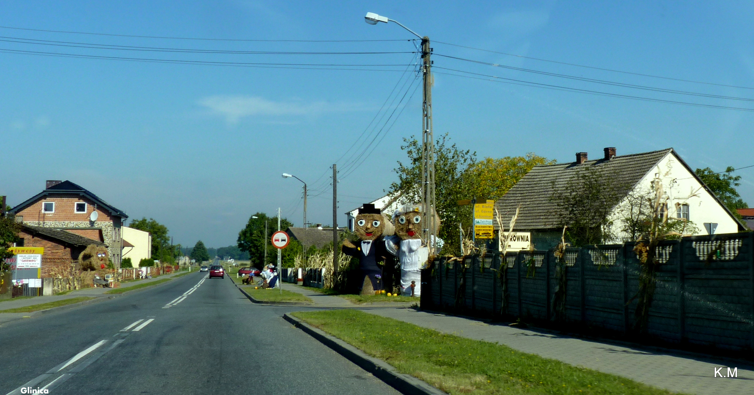 Glinica- wystrój dożynkowy